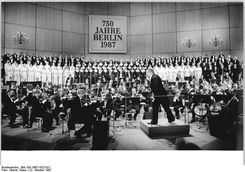 ADN-ZB Oberst 22.10.87 Berlin: Jubiläum-Staatsakt. Zum Staatsakt am 23.10. im Palast der Republik anläslich des 750jährigen Stadtjubiläums von Berlin wird die IX. Sinfonie von Ludwig van Beethoven unter Leitung von Generalmusikdirektor Prof. Kurt Sanderling aufgeführt. Foto von der Generalprobe. (siehe auch Nr. 1987-1022-22, 23!)